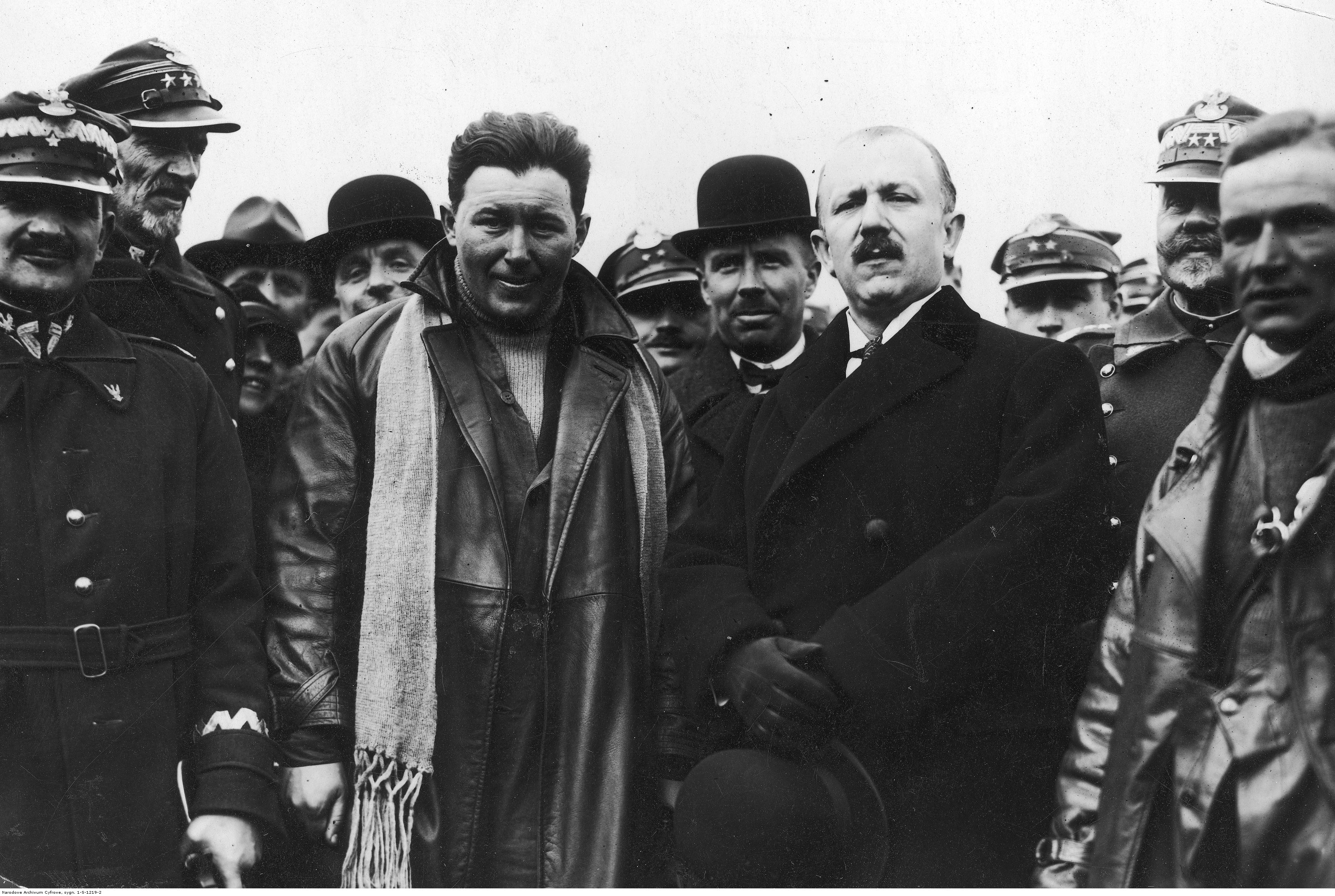 Lot kapitana Bolesława Orlińskiego Warszawa - Tokio. Powitanie po powrocie do Warszawy. Bolesław Orliński (w szalu) w towarzystwie premiera prof. Kazimierza Bartla (na pierwszym planie, po lewej stronie Orlińskiego), wiceministra spraw wojskowych gen. Daniela Konarzewskiego (drugi od prawej, częściowo zasłonięty) i mechanika Leona Kubiaka (pierwszy z prawej - przed Danielem Konarzewskim). Koncern Ilustrowany Kurier Codzienny - Archiwum Ilustracji. Sygnatura: 1-S-1219-2